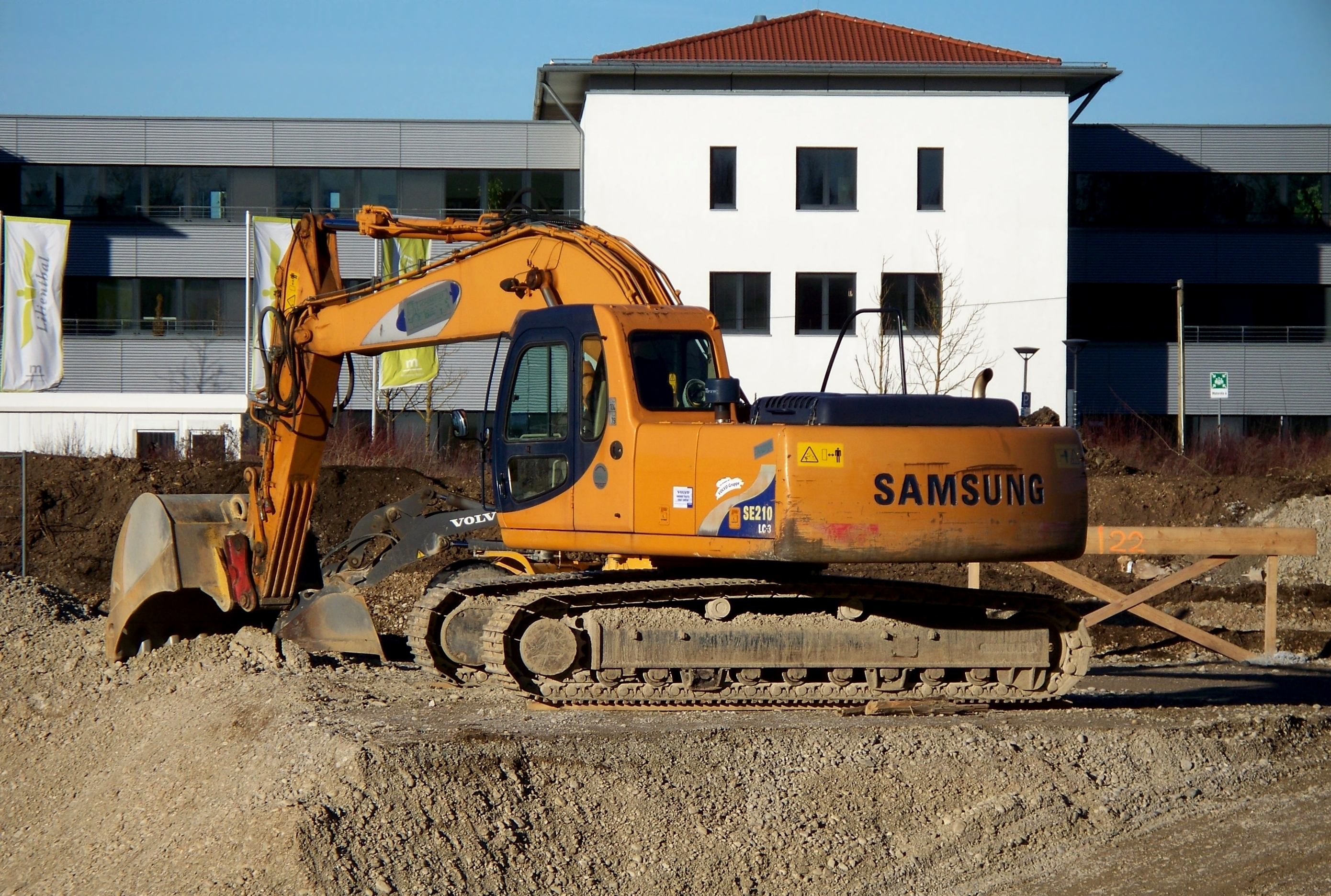 Ein Samsung-Löffelbagger auf Kettenfahrgestell.